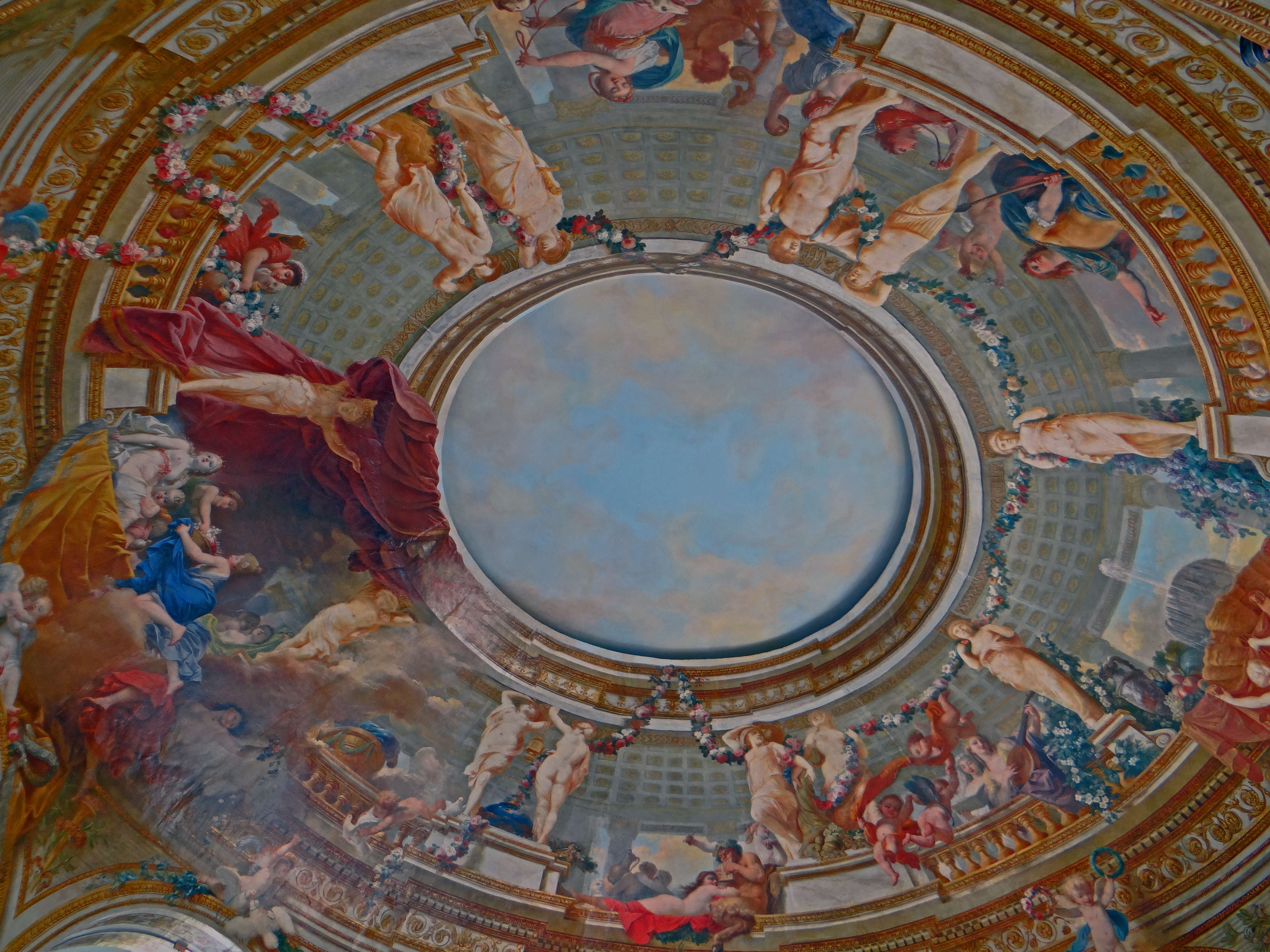 Musée du Louvre - Département des Objets d'art - Salle 52 - Hôtel du prince de Condé - Coupole Callet